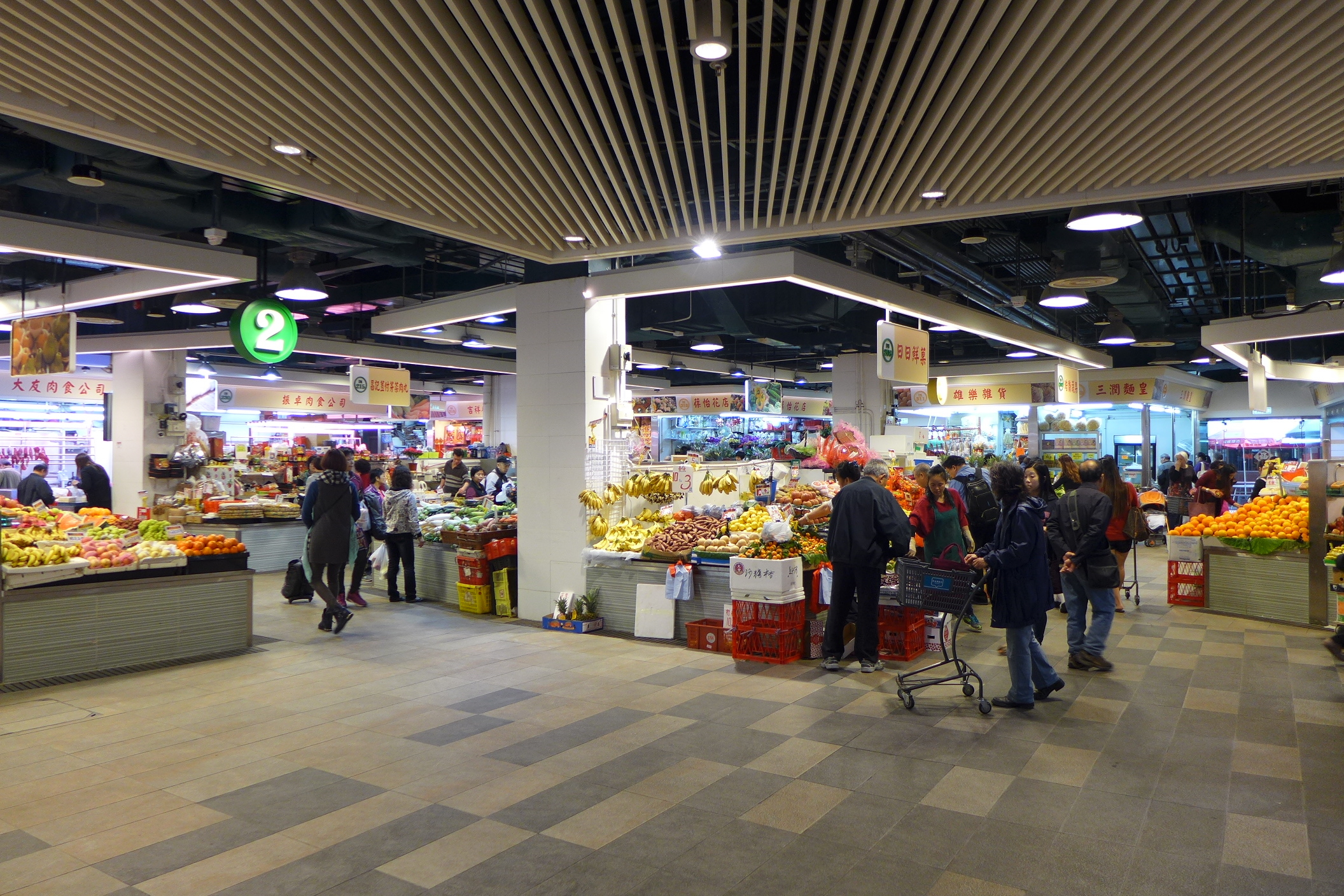 H.A.N.D.S Zone D Market